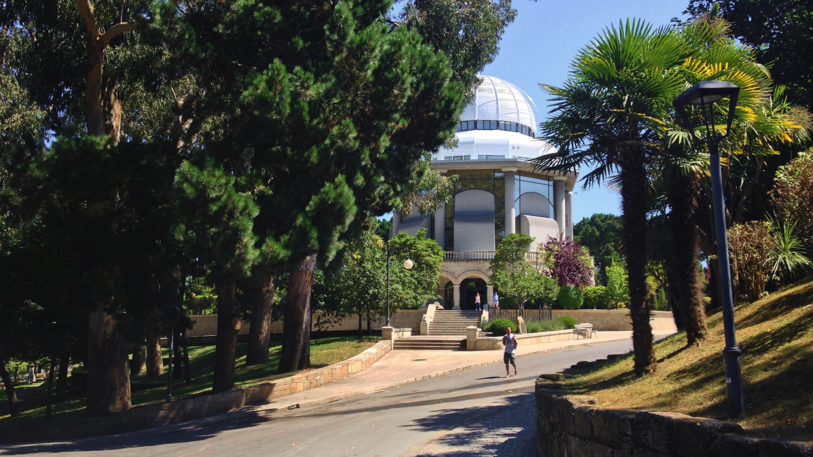 Es un museo de la Ciudad de La Coruña, Galicia, España.